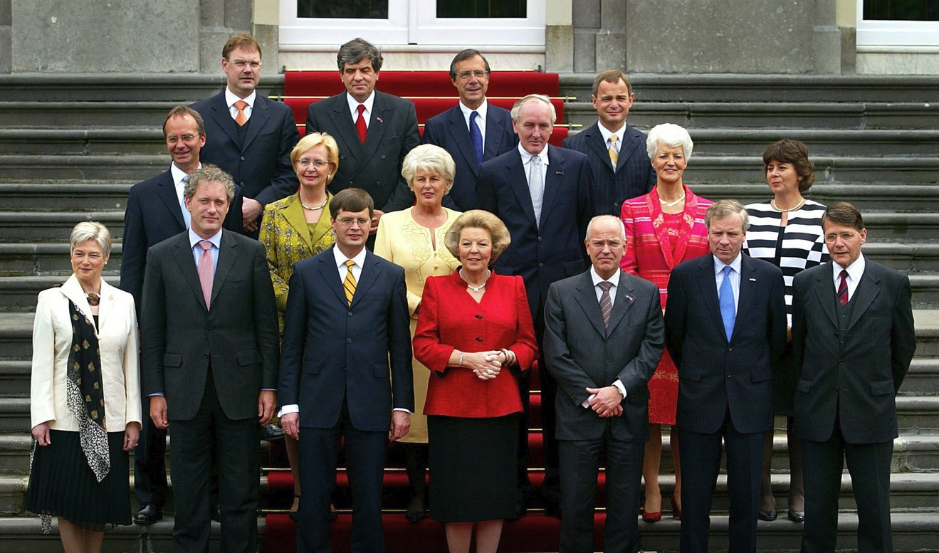 De bordesscène van het kabinet-Balkenende II bij Huis ten Bosch op 27 mei 2003